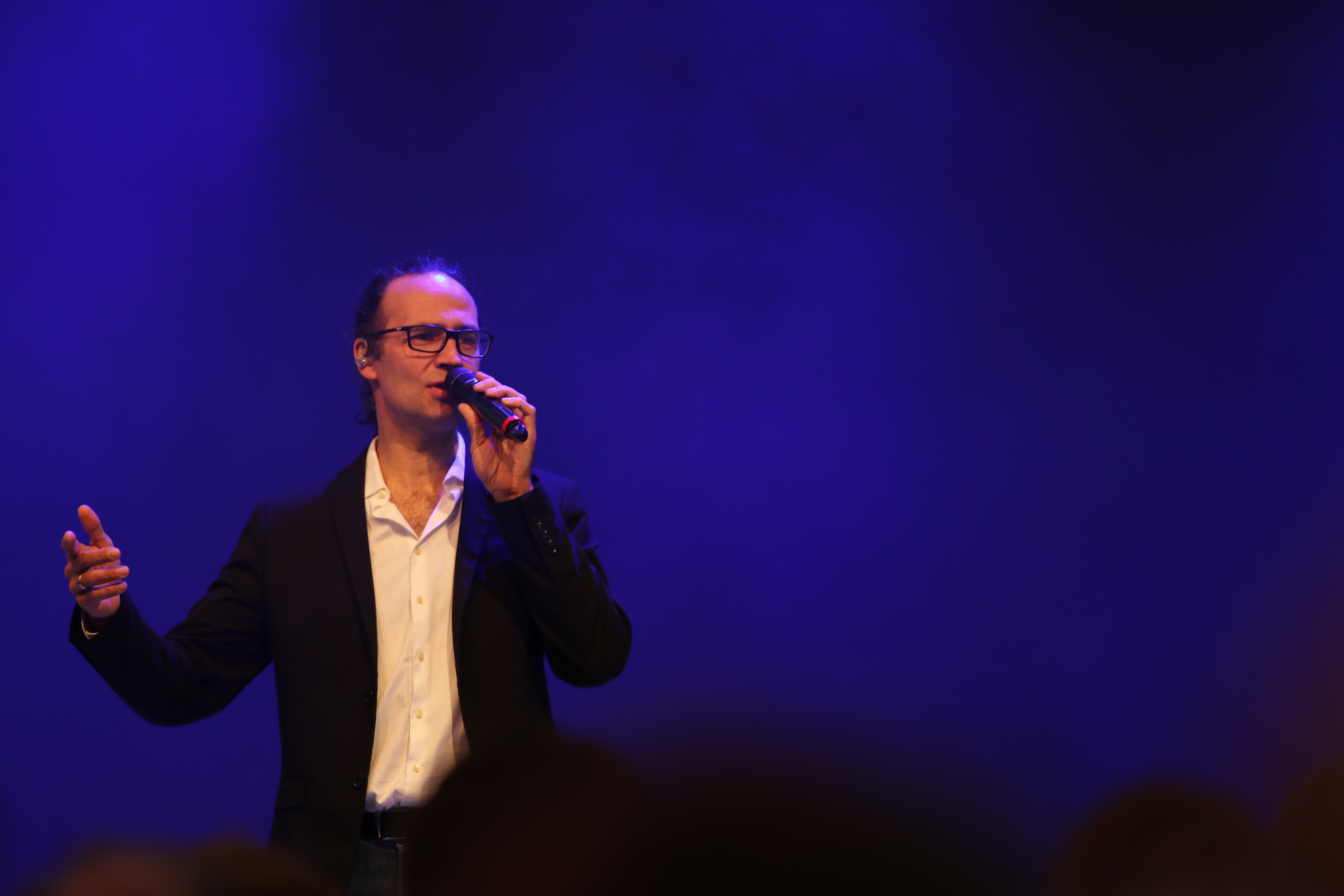 Edzard „Eddi“ Hüneke, Wise Guys in München